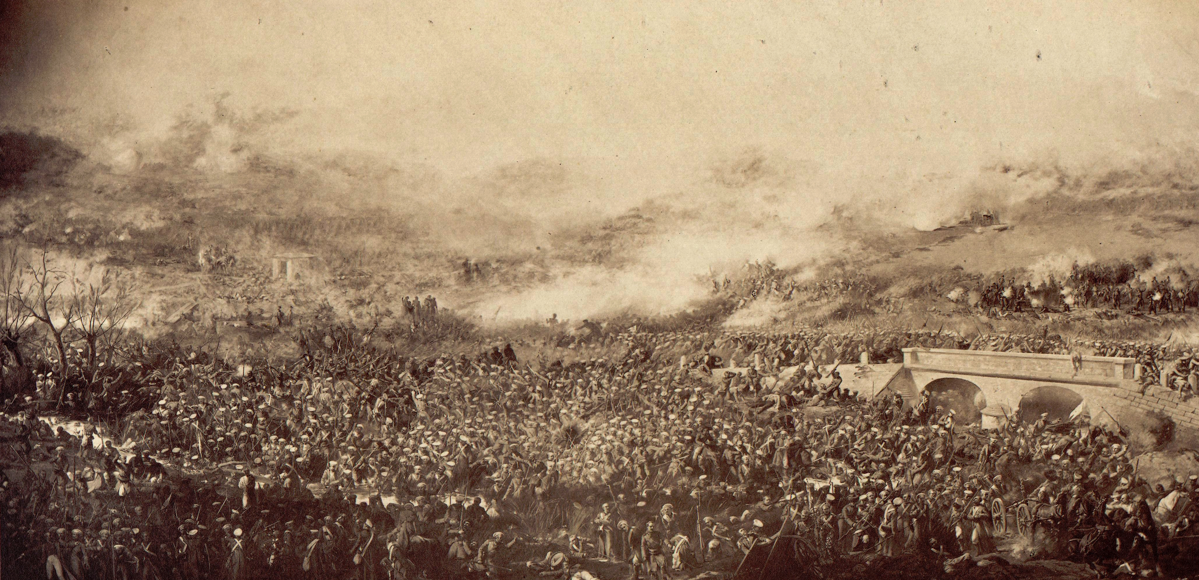 Hall des sculptures et cimaises du salon de 1861 (Palais de l'industrie), photographie de Pierre-Ambroise Richebourg, largeur du cliché : environ 27 cm. Vue n°44, extraite d'un album de 42 vues. BnF inv : FOL-AD-1104 - Détail : Bataille du pont de Tracktir (Crimée) 16 août 1855, grand tableau d'Antoine Rivoulon, n°2700.